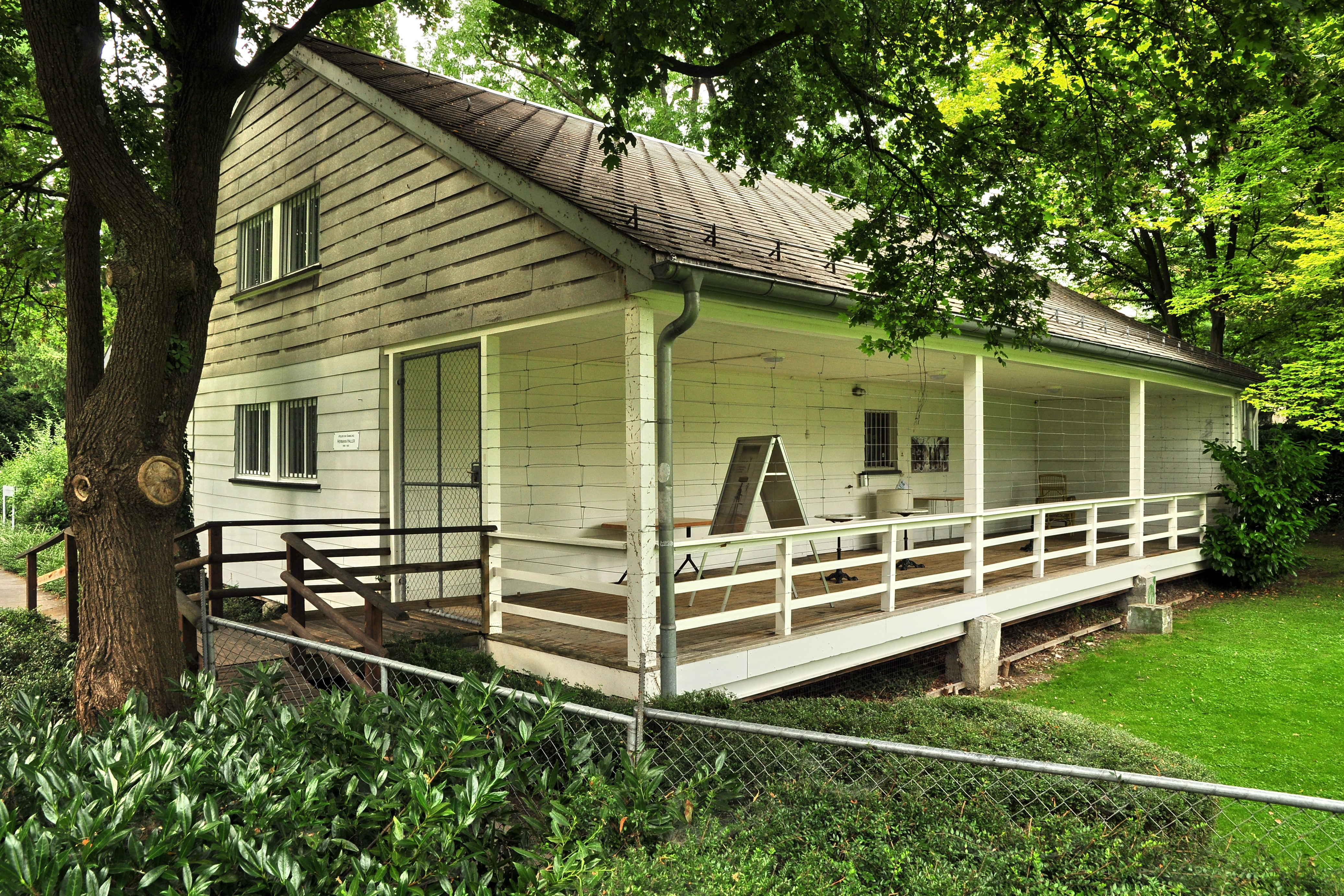 Atelier Hermann Haller in Zürich-Seefeld (Switzerland)